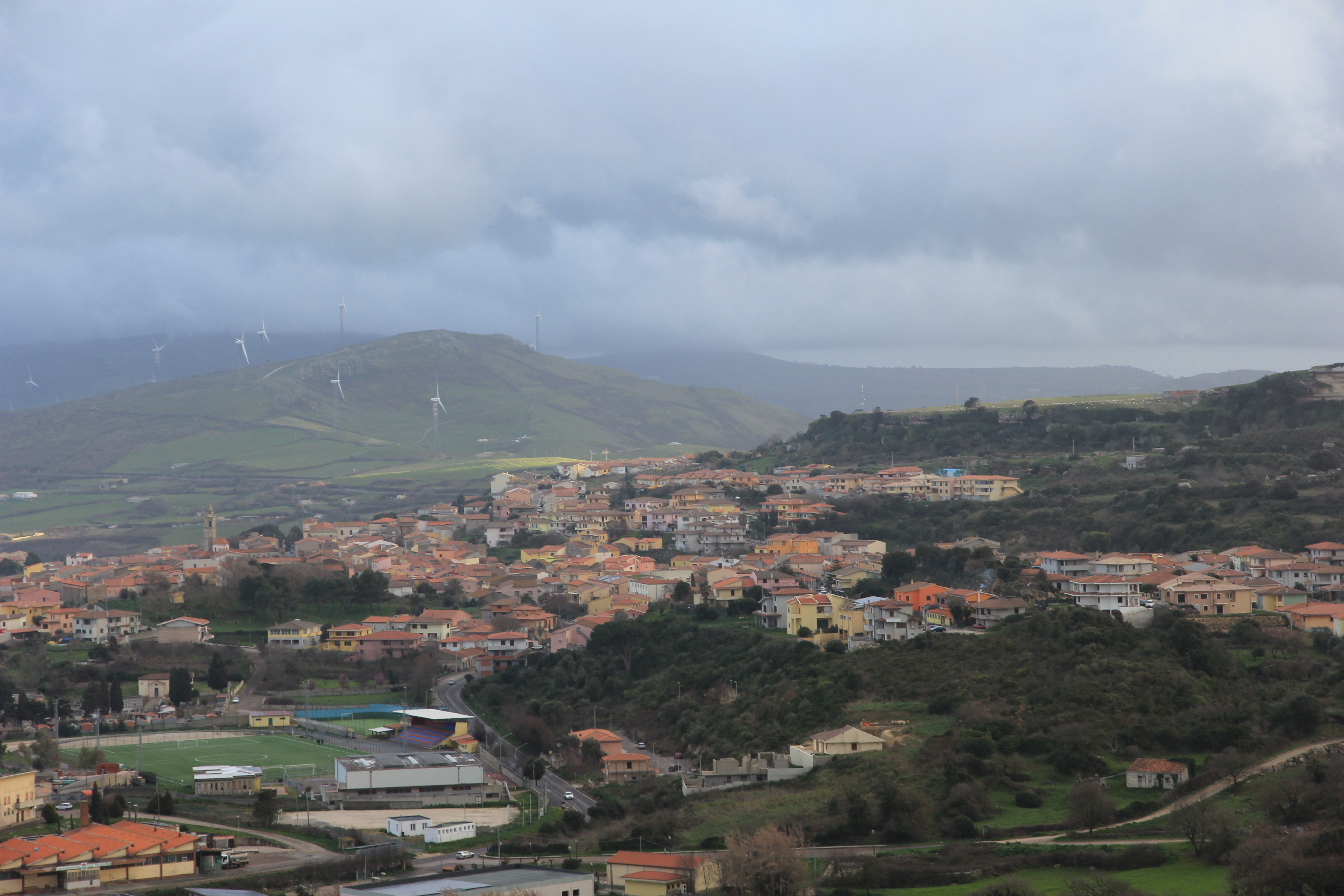 Nulvi - Panorama